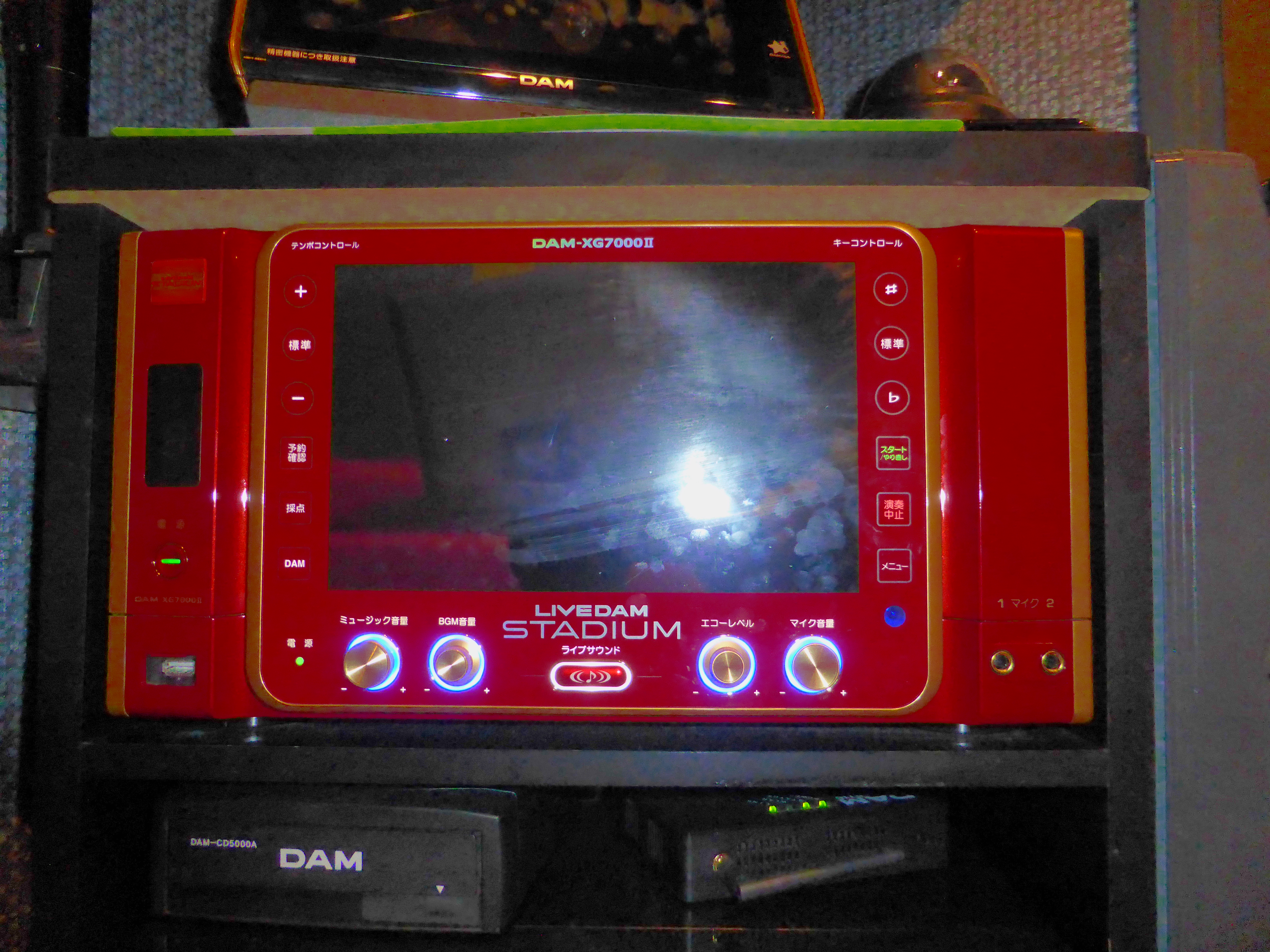 LIVE DAM STADIUM STAGE（ライブダムスタジアムステージ）DAM-XG7000II